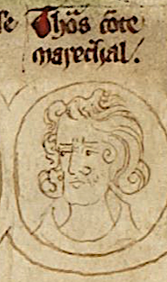 Thomas of Brotherton, 1st Earl of Norfolk